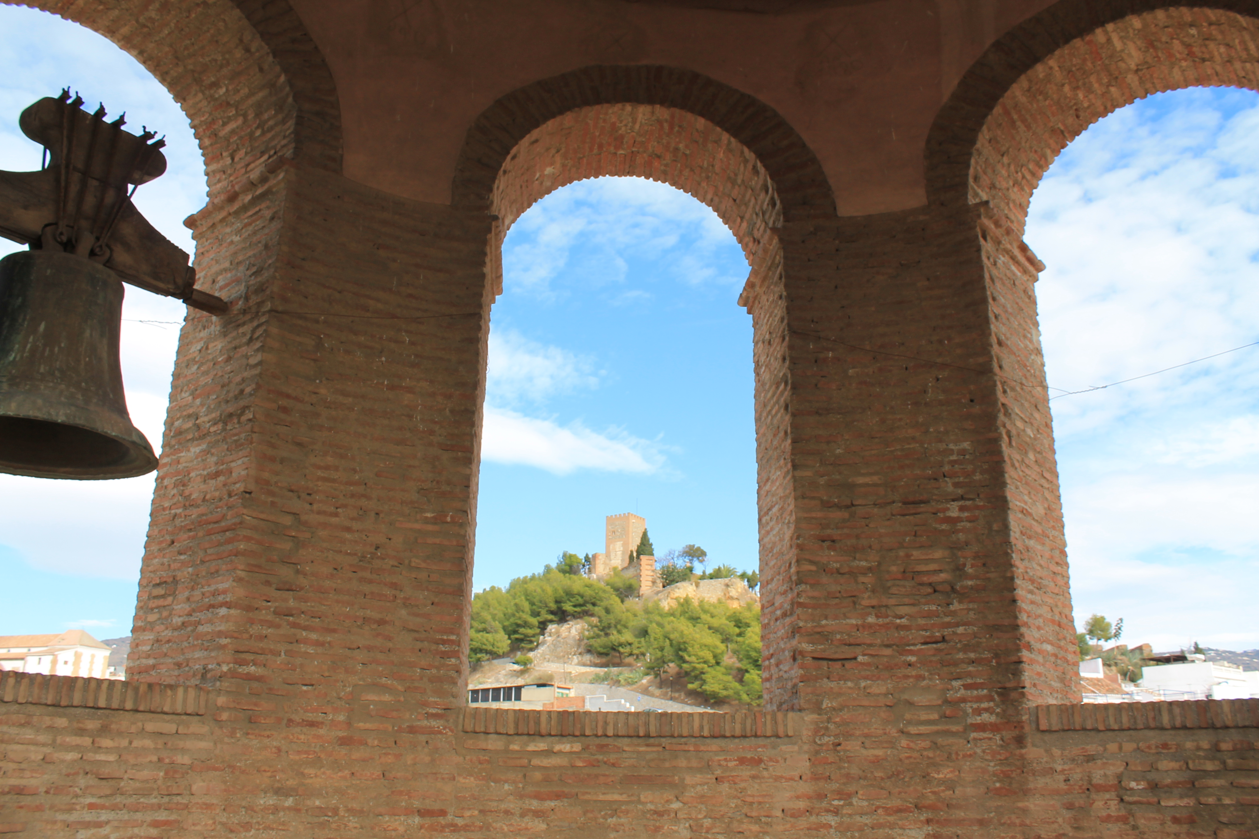 Campanario de la iglesia de San Juan, Vélez-Málaga, España.